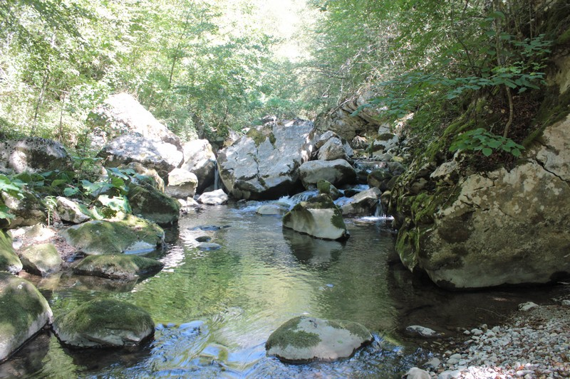 Специјални резерват природе Клисура реке Трешњице